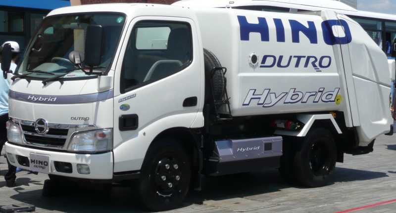 デュトロハイブリッドのごみ収集車